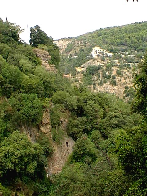 Tivoli Villa Gregoriana (Valle dell'Inferno) by Lalupa